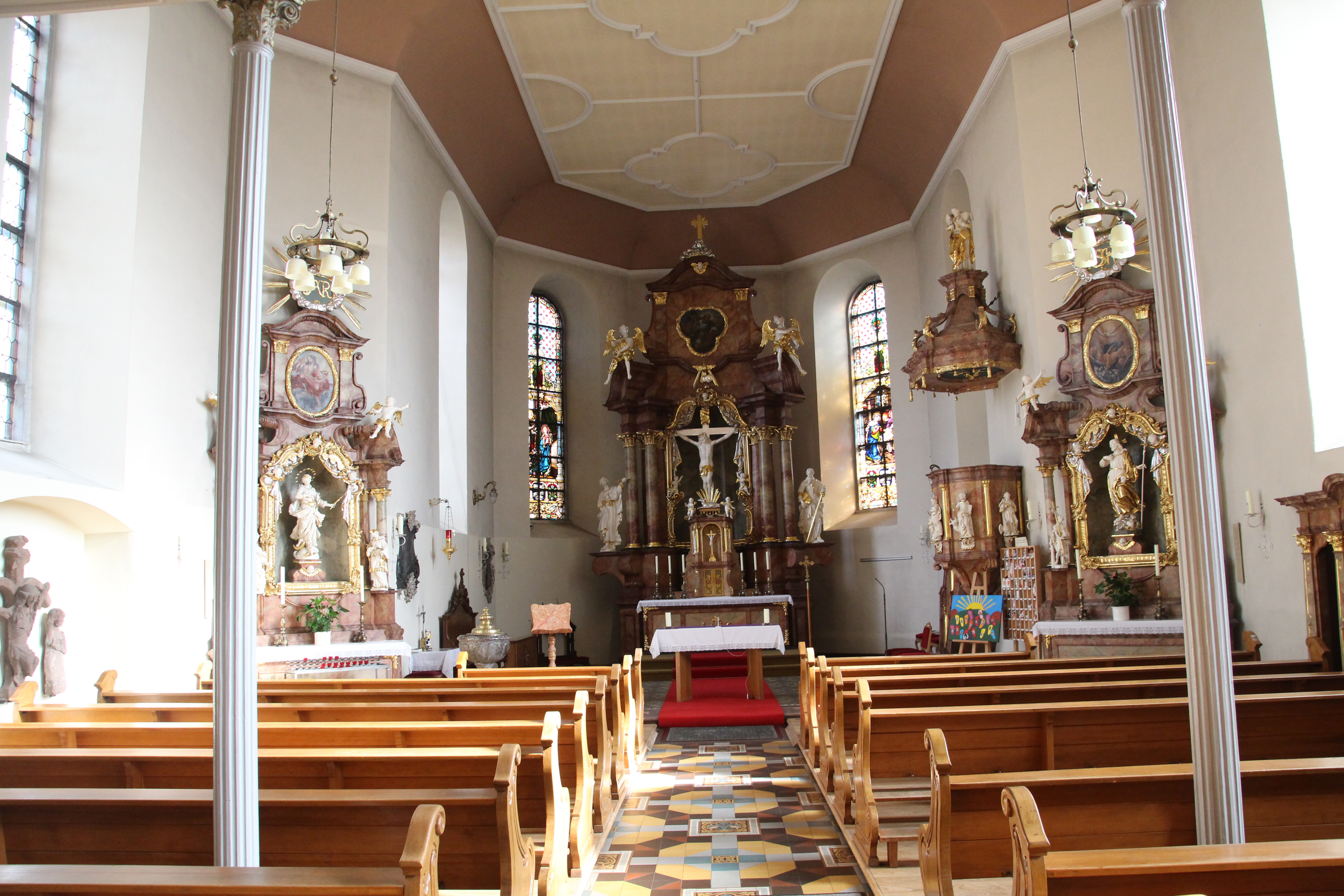 Kirch Heldenberg